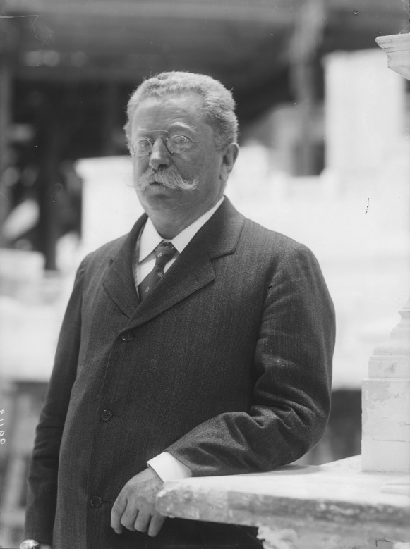 Gaetano Koch fotografato da Mario Nunes Vais